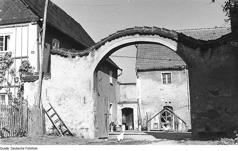 Original image description from the Deutsche FotothekRadibor-Schwarzadler. Ehem. Windmühlengehöft